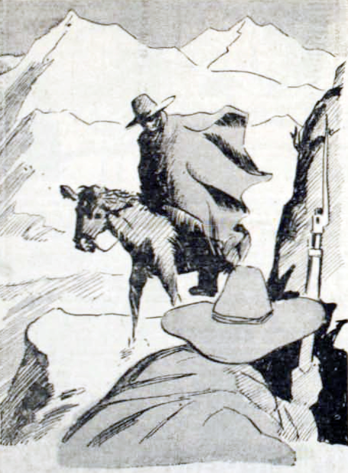 "Tuvo Miguel Neira gran participación en la lucha contra la reconquista española" José Miguel Neira Mondaca (n. Maule; 1775 - f. Talca; 1817) conocido como el bandido Neira, fue un chileno bandolero, guerrillero y posteriormente un militar que se unió a la causa patriota durante la Guerra de Independencia y que asoló las regiones de Curicó, Talca, Rancagua dedicándose al abigeato y al pillaje de viajeros por la región.